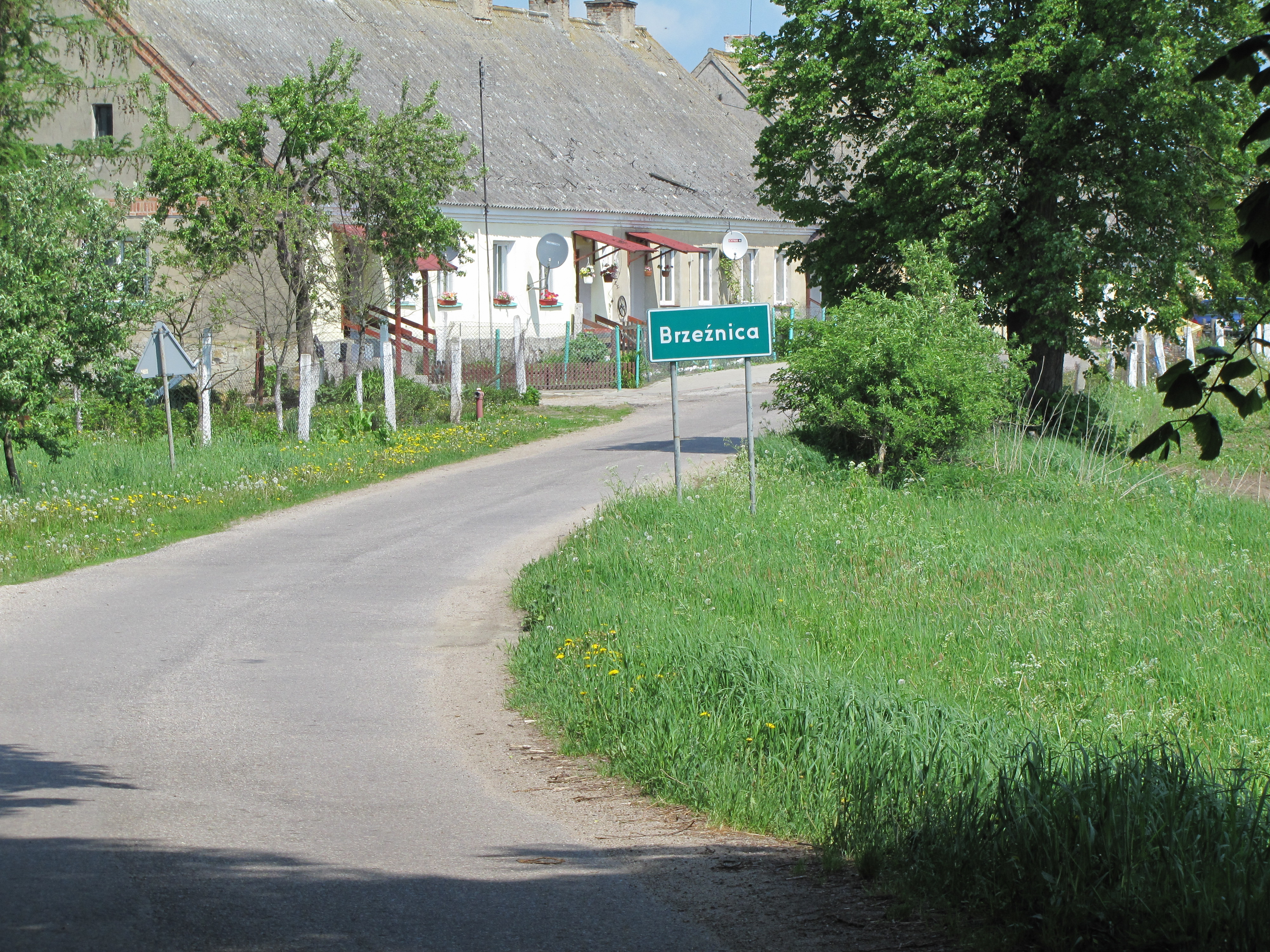 Wjazd do miejscowości.